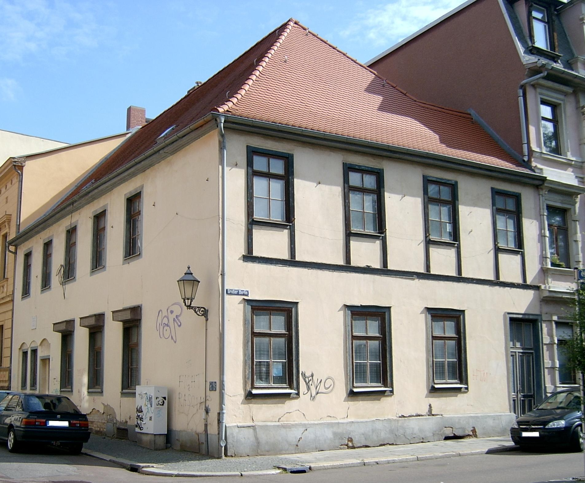 Die Große Märkerstraße 12 in Halle (Saale) an der Ecke vom Großen Berlin